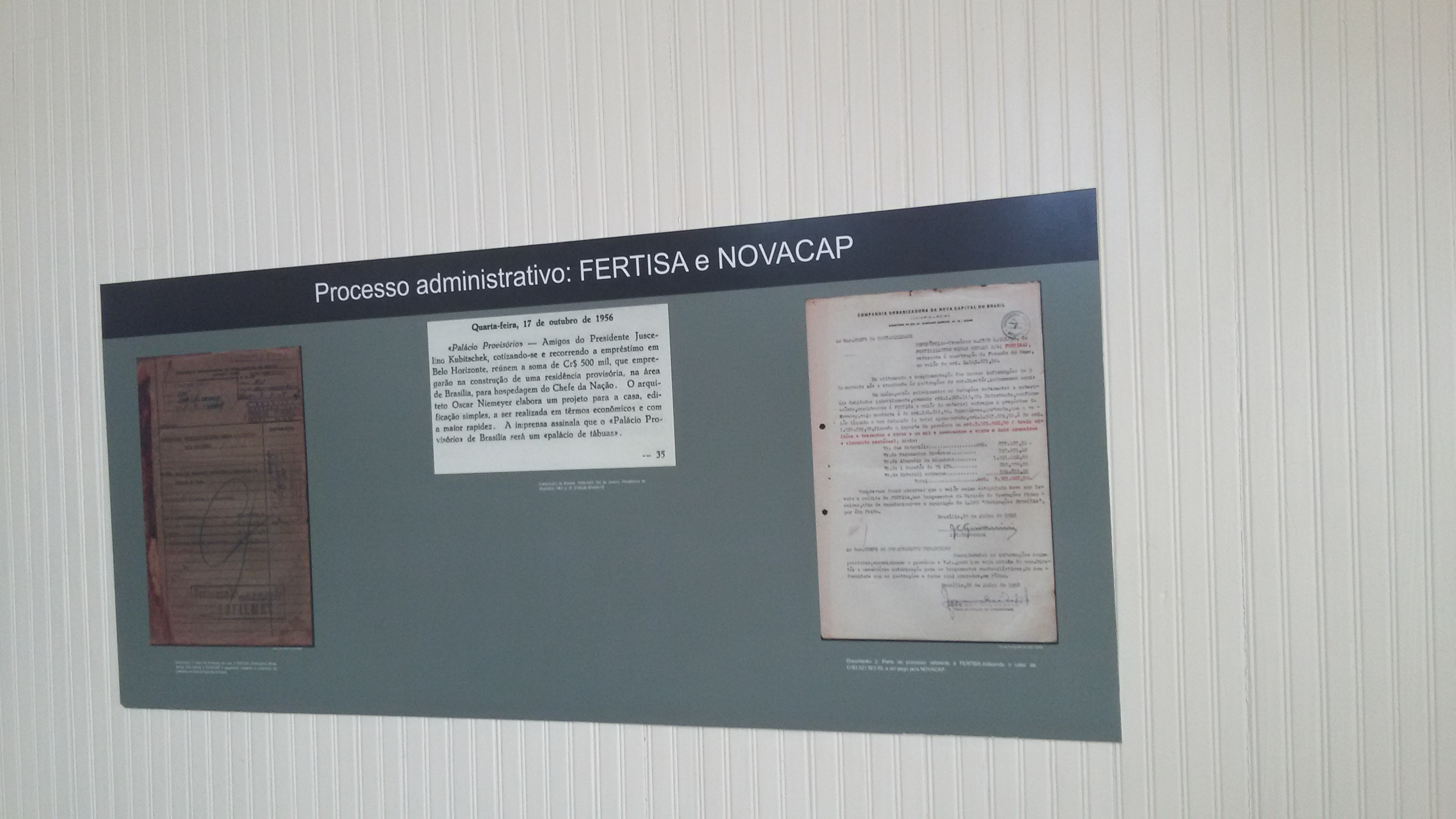 placas pueden ser vistas en el local donde seu cuenta la história de personas o contrucciones